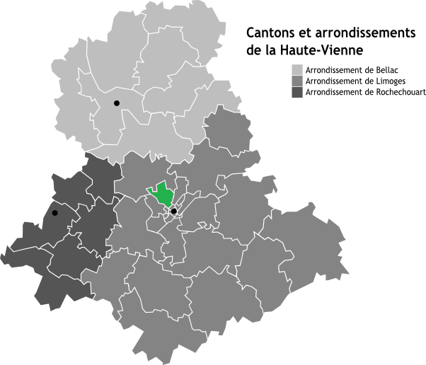 Canton de Limoges-Couzeix, Limousin, France en Carte des arrondissements de la Haute-Vienne